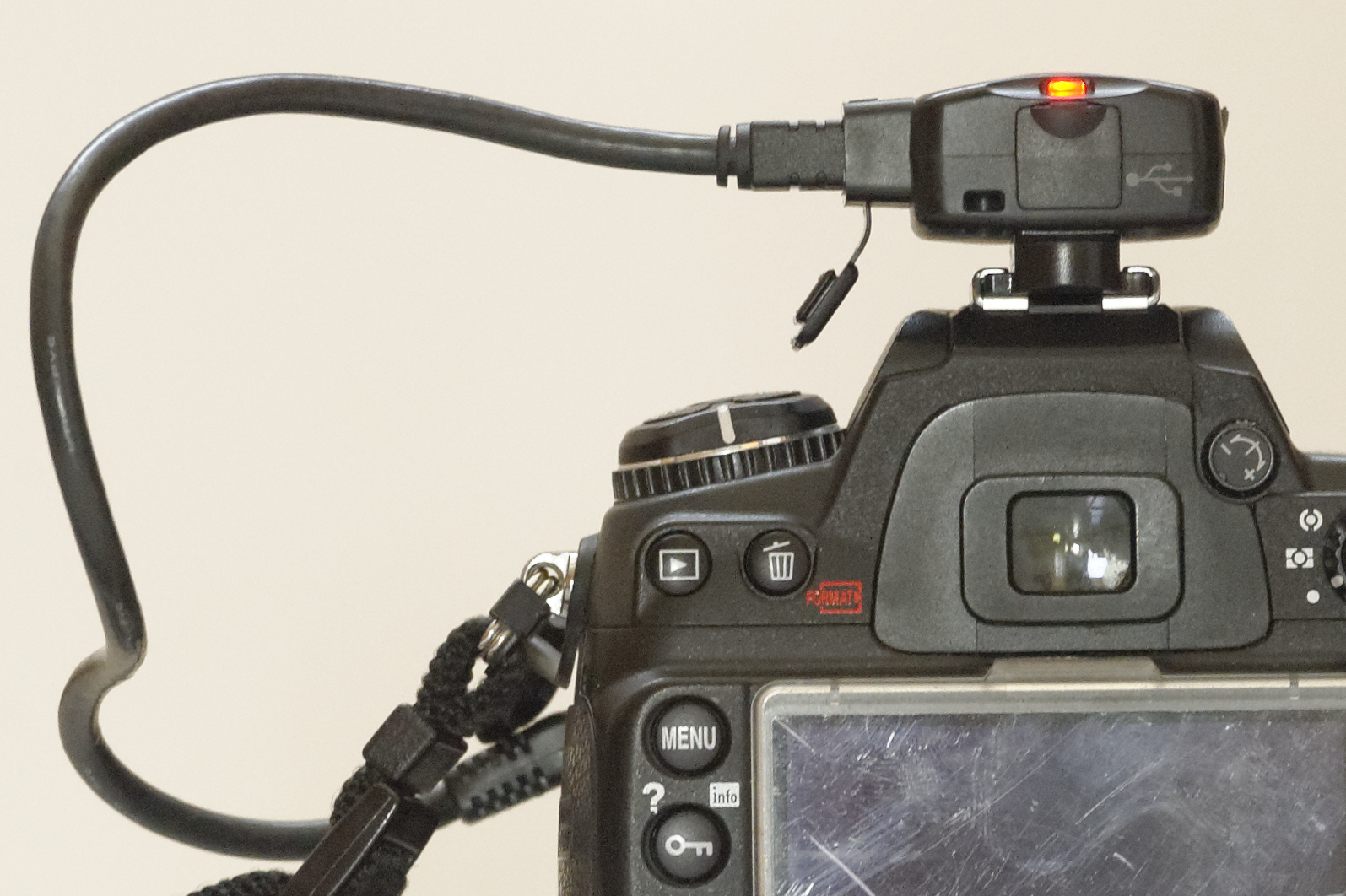 Nikon GP-1